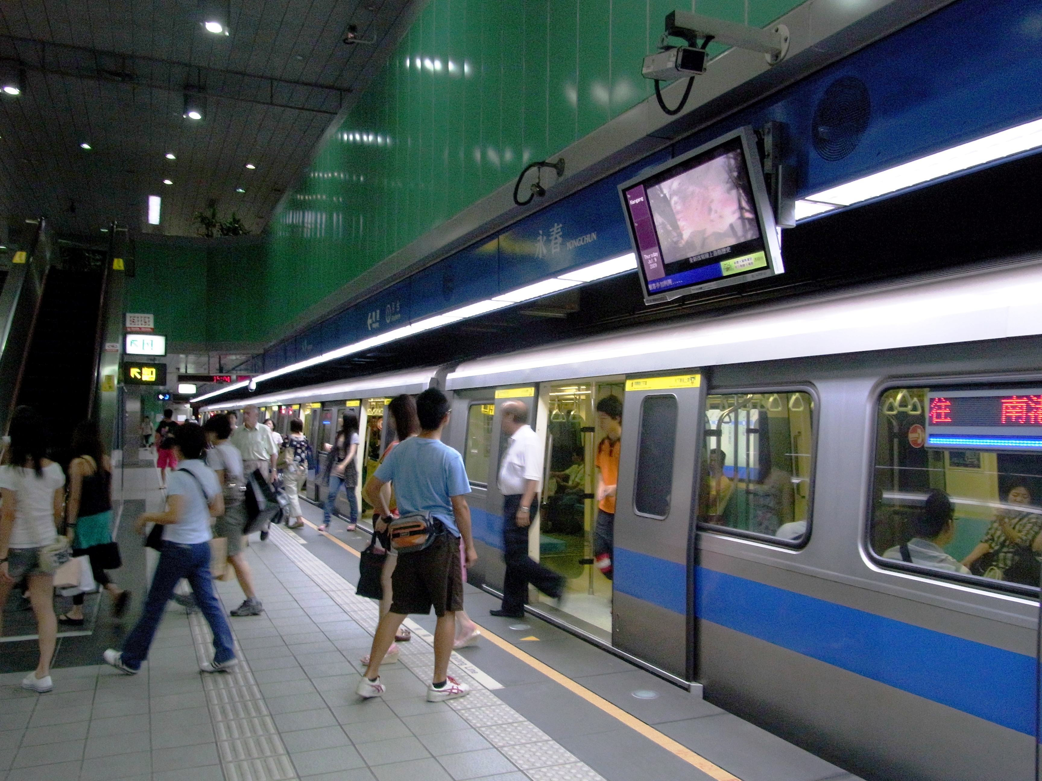 永春站南港線月台